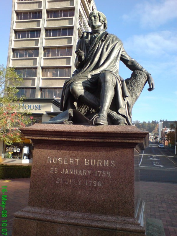 Robert Burns, Dunedin.